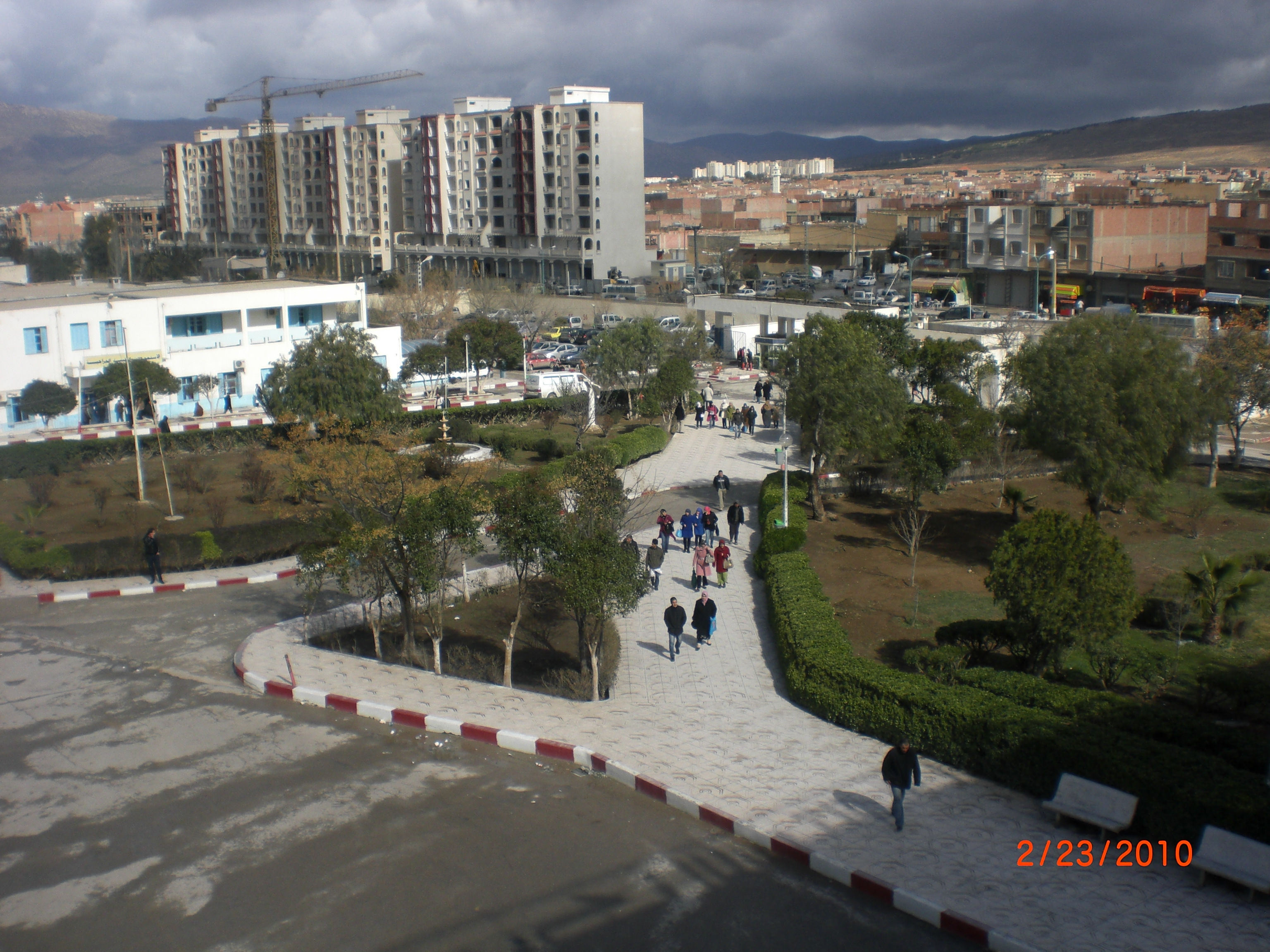 batiment bazzala